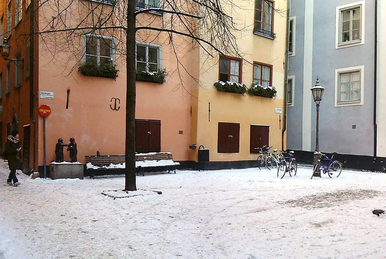 Gåstorget in Gamla stan.